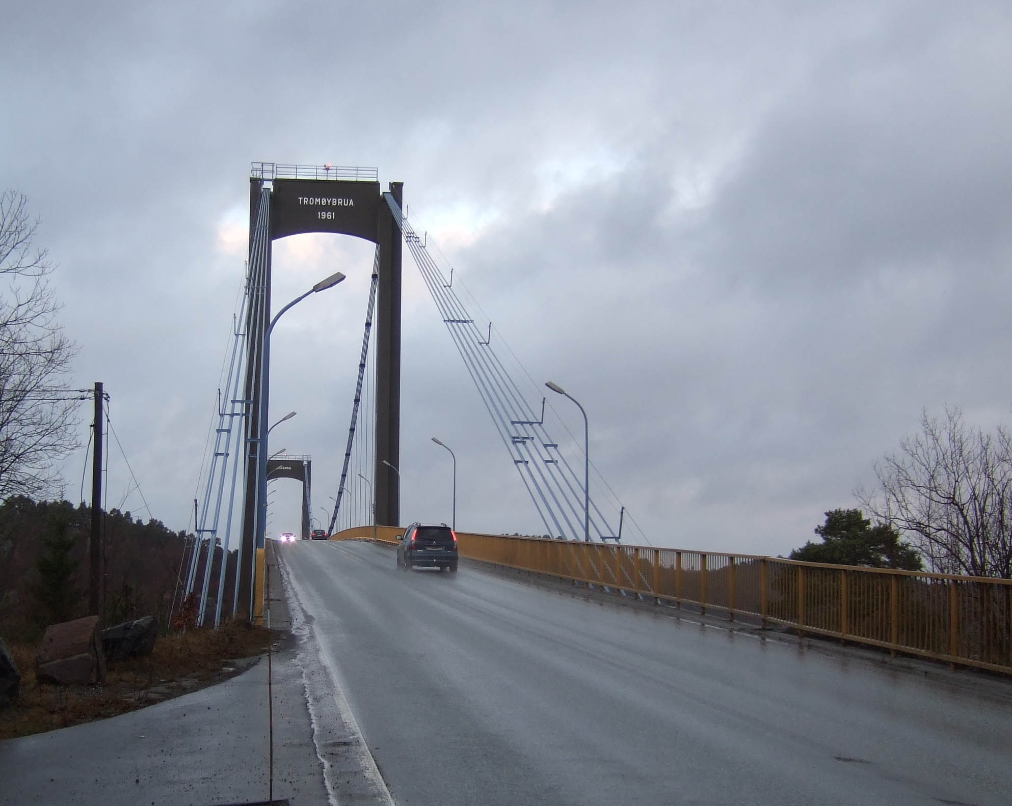 Tromoybroen